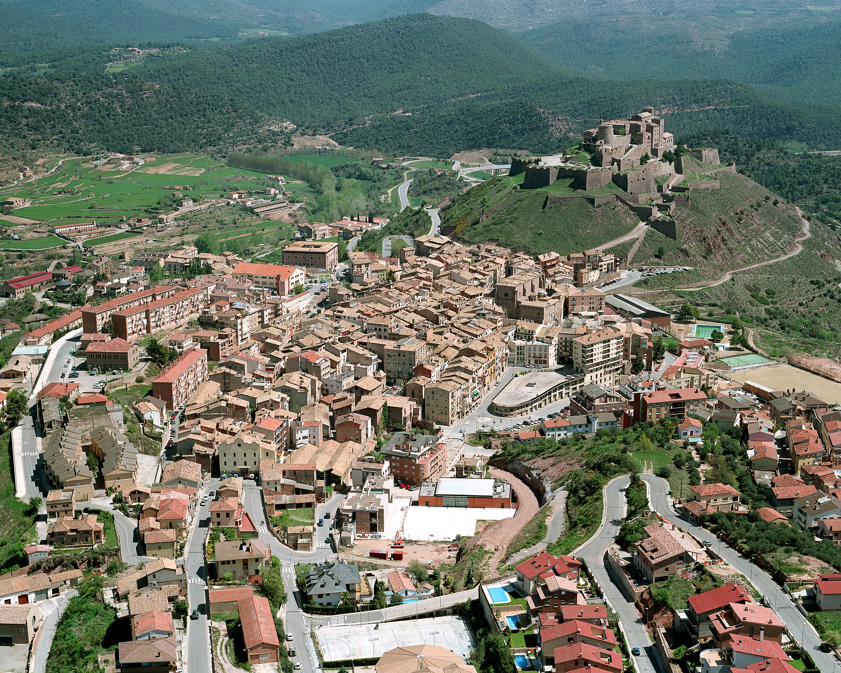 Parador de Cardona